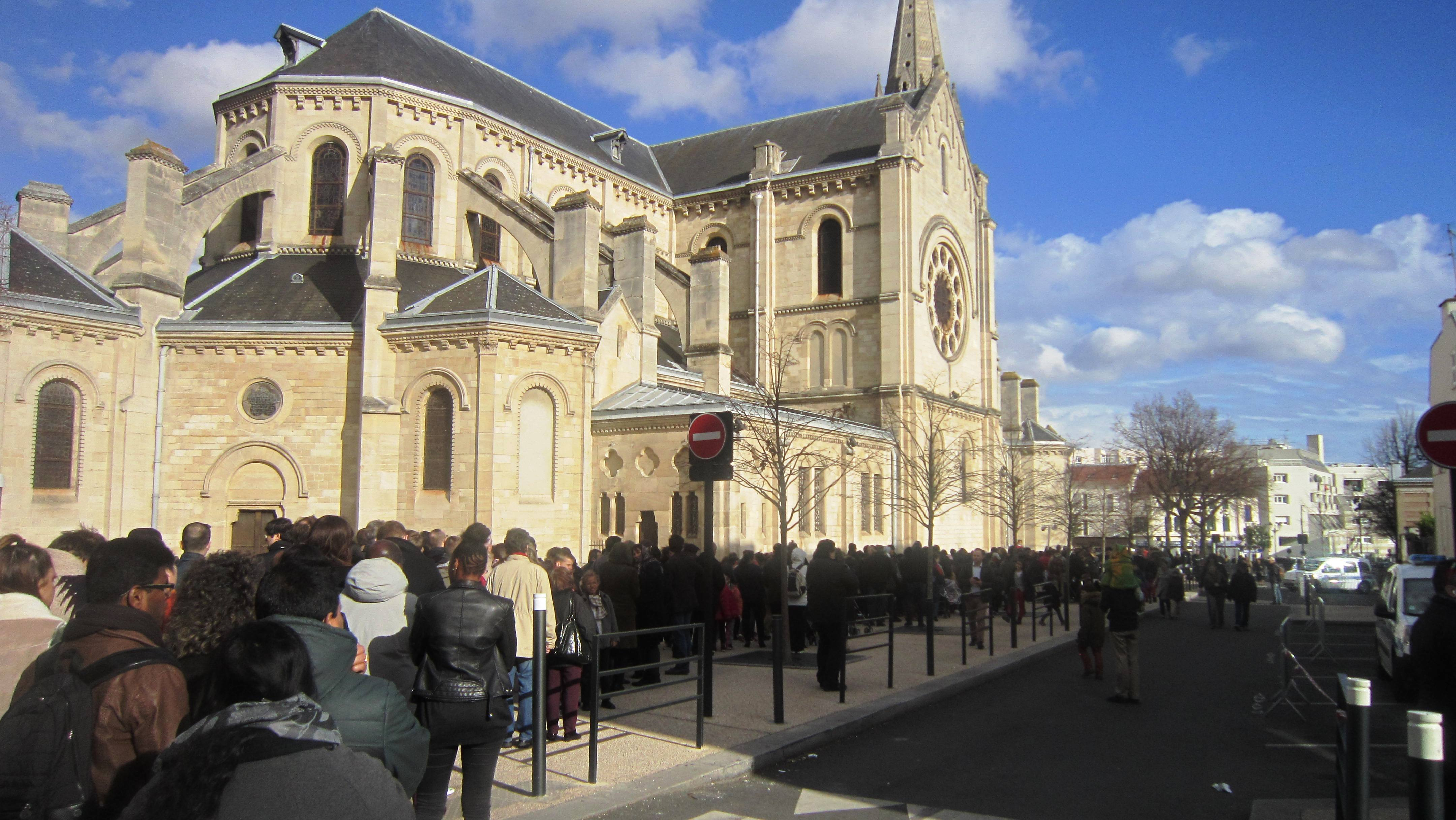 Pèlerinage 2016 à Argenteuil